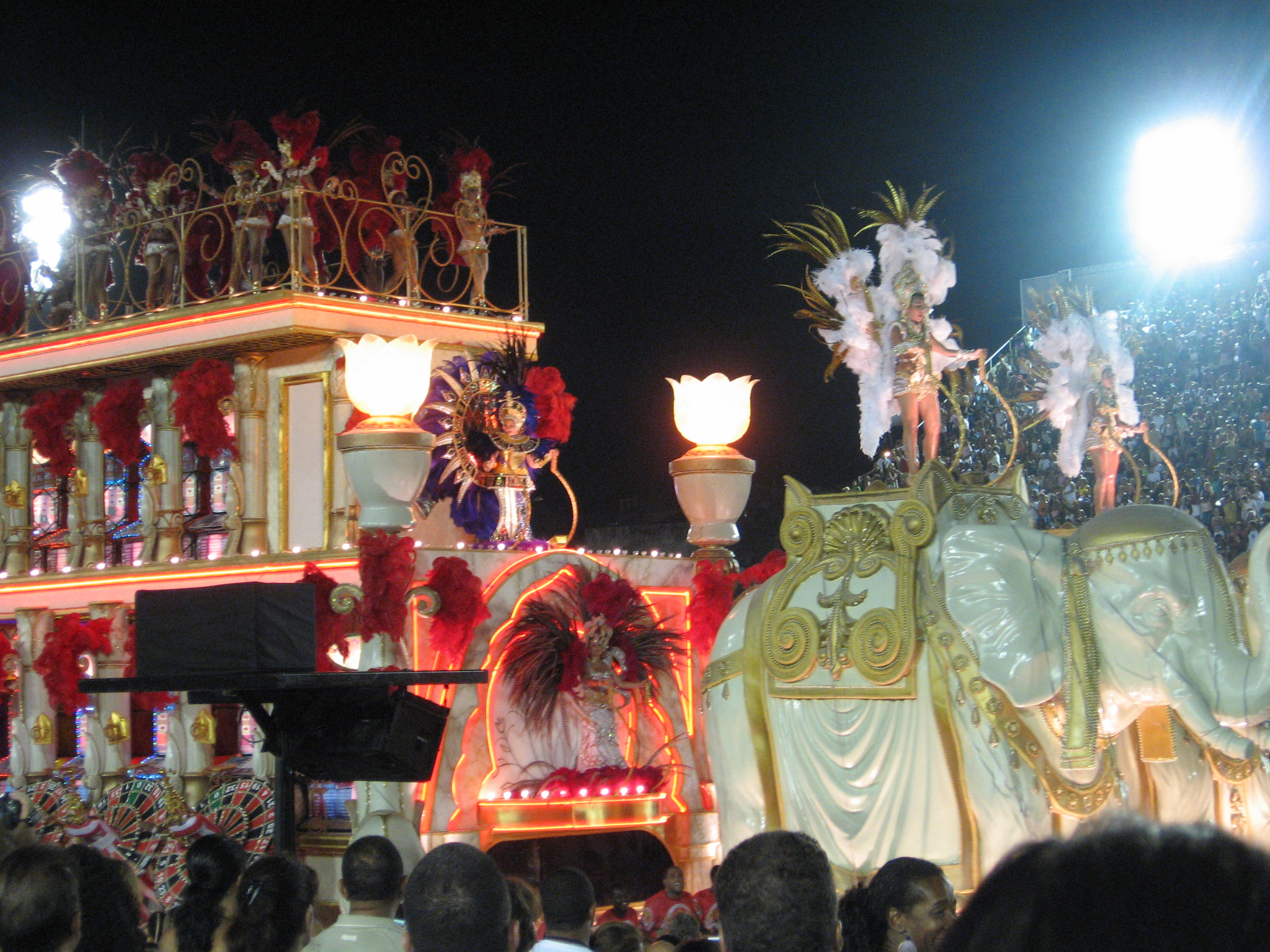 Desfile da Viradouro em 2007.